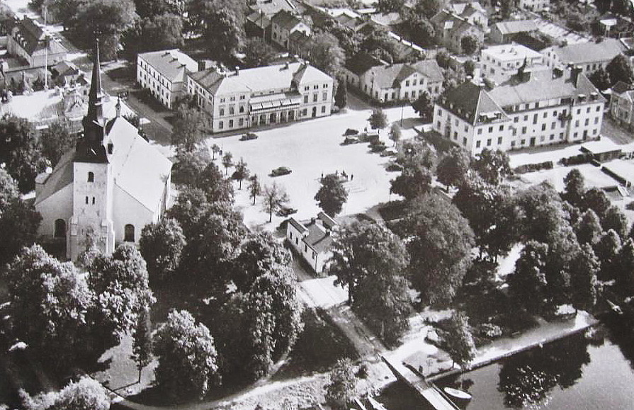 Lindesberg: Rådhusplatsen, Stadshotellet och kyrkan